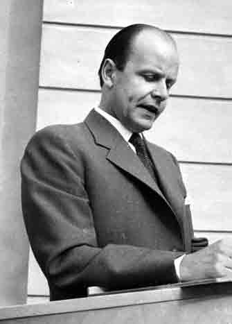 Ragnar Edenman. Statsrådet invigningstalar, Upplandsmuseet, Uppsala